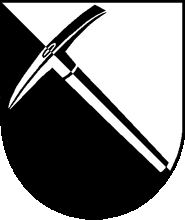 Wappen von Ferrera Kanton Graubünden Schweiz